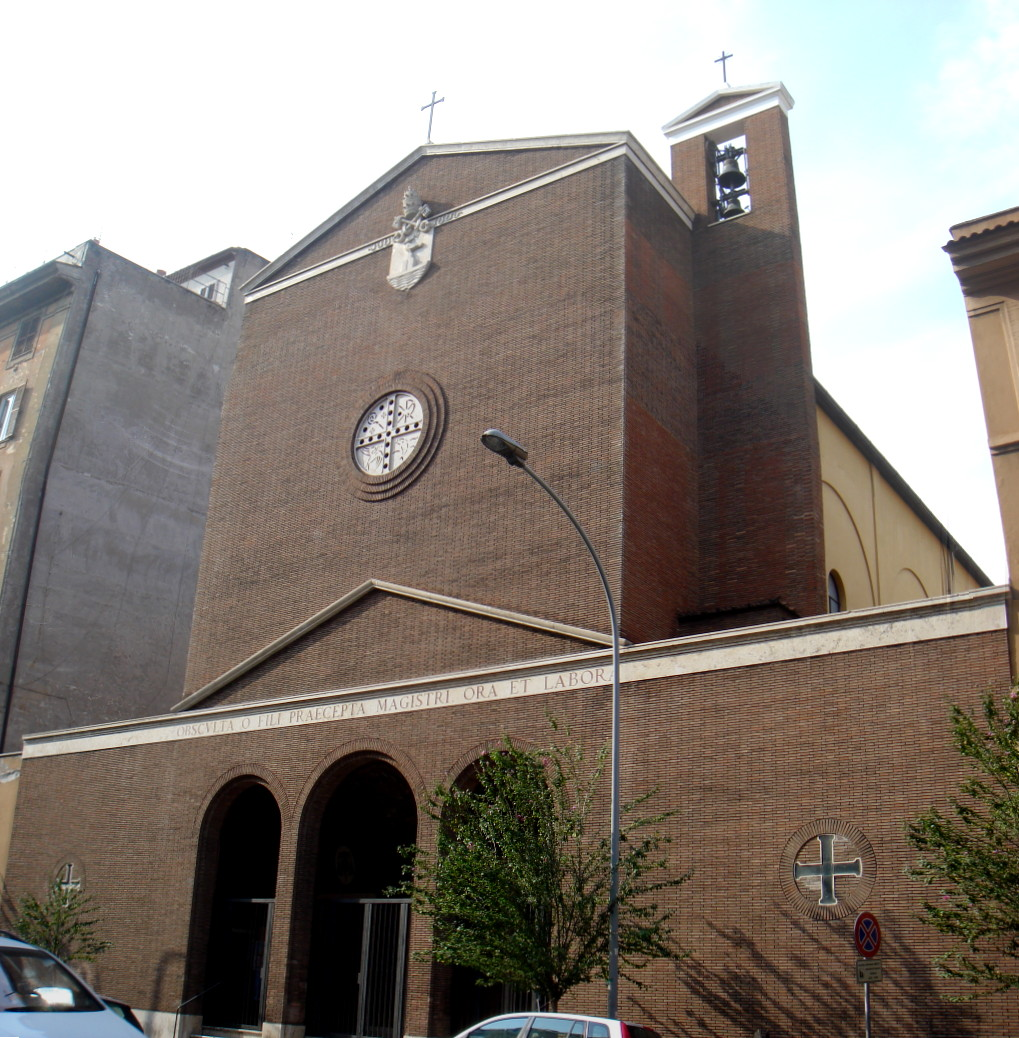 Roma, san Benedetto fuori Porta san Paolo (1926)